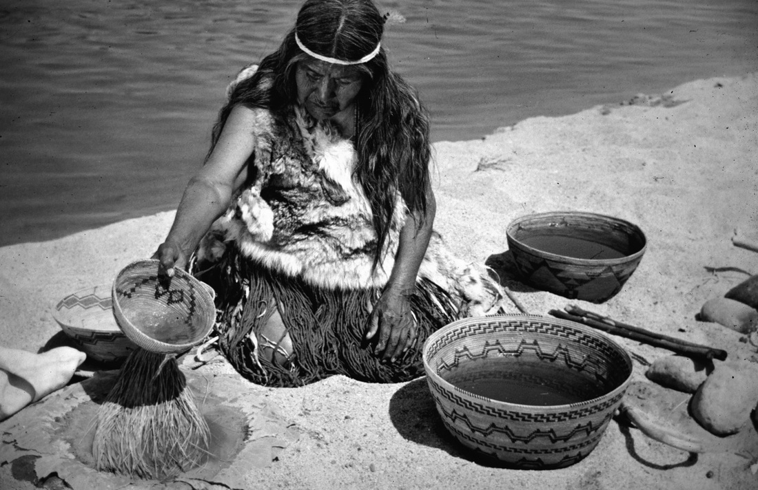 Племе Йокути